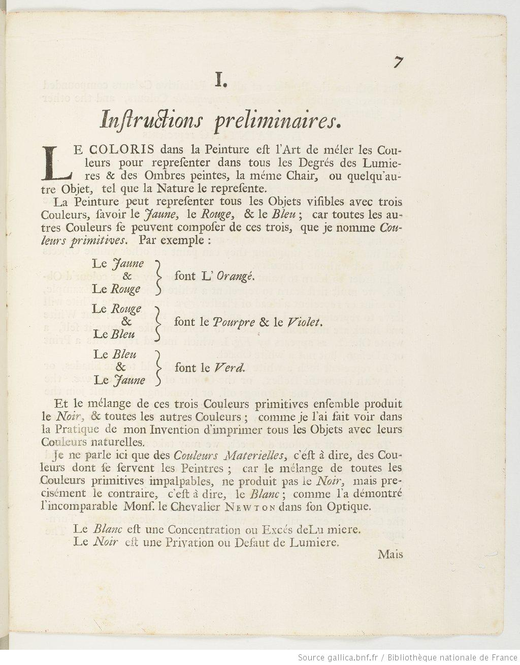 Préliminaires page 1 du Coloritto de Le Blon, publié à Londres.